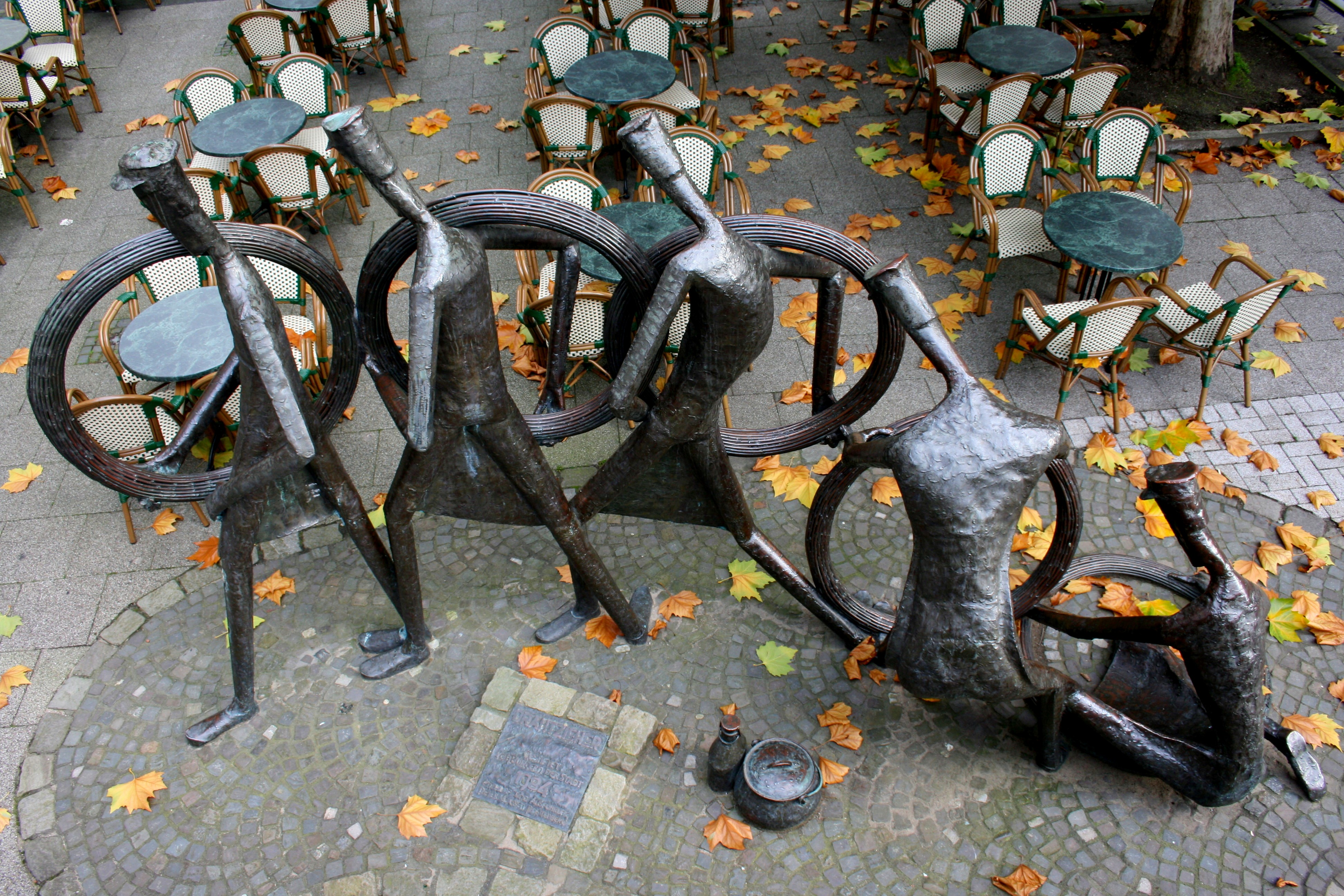 Drahtzieher von Peter Klassen auf dem Jägerplatz in Altena